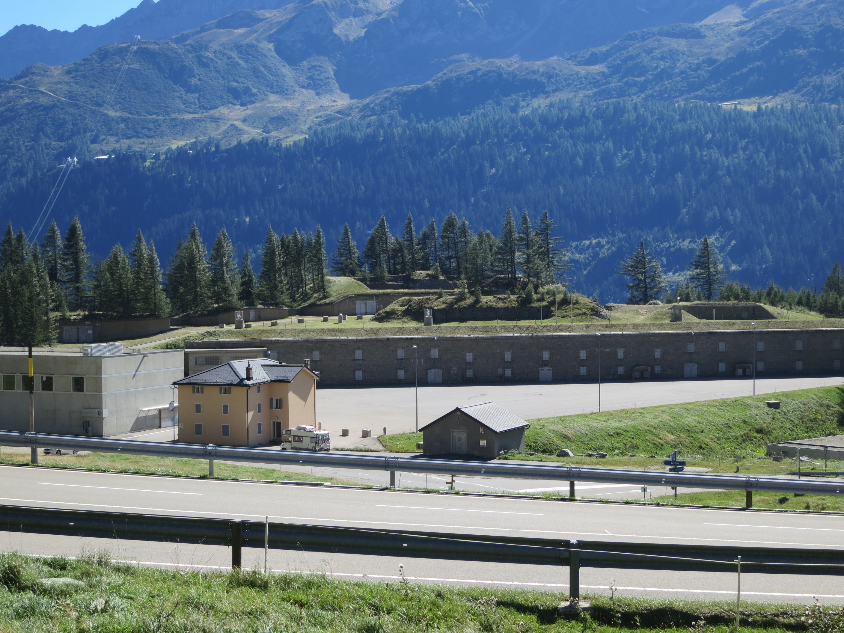 Fort Motto Bartola, Airolo, Schweiz